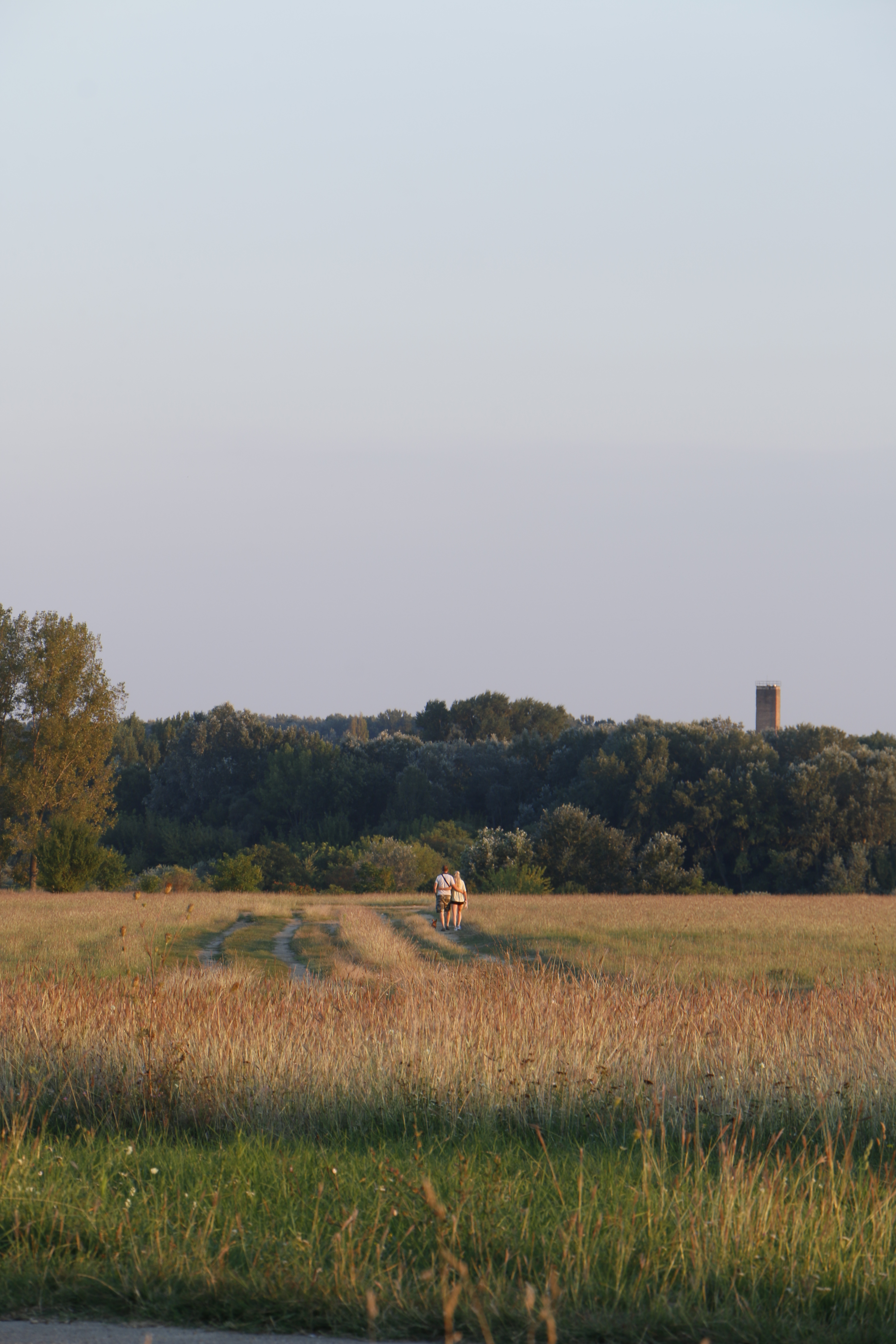 Mátyásföldi repülőtér részlet